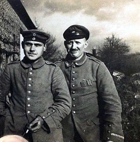 Preußische Soldaten gemäß Uniform und Korkaden im 1. Weltkrieg um 1916 in Frankreich.